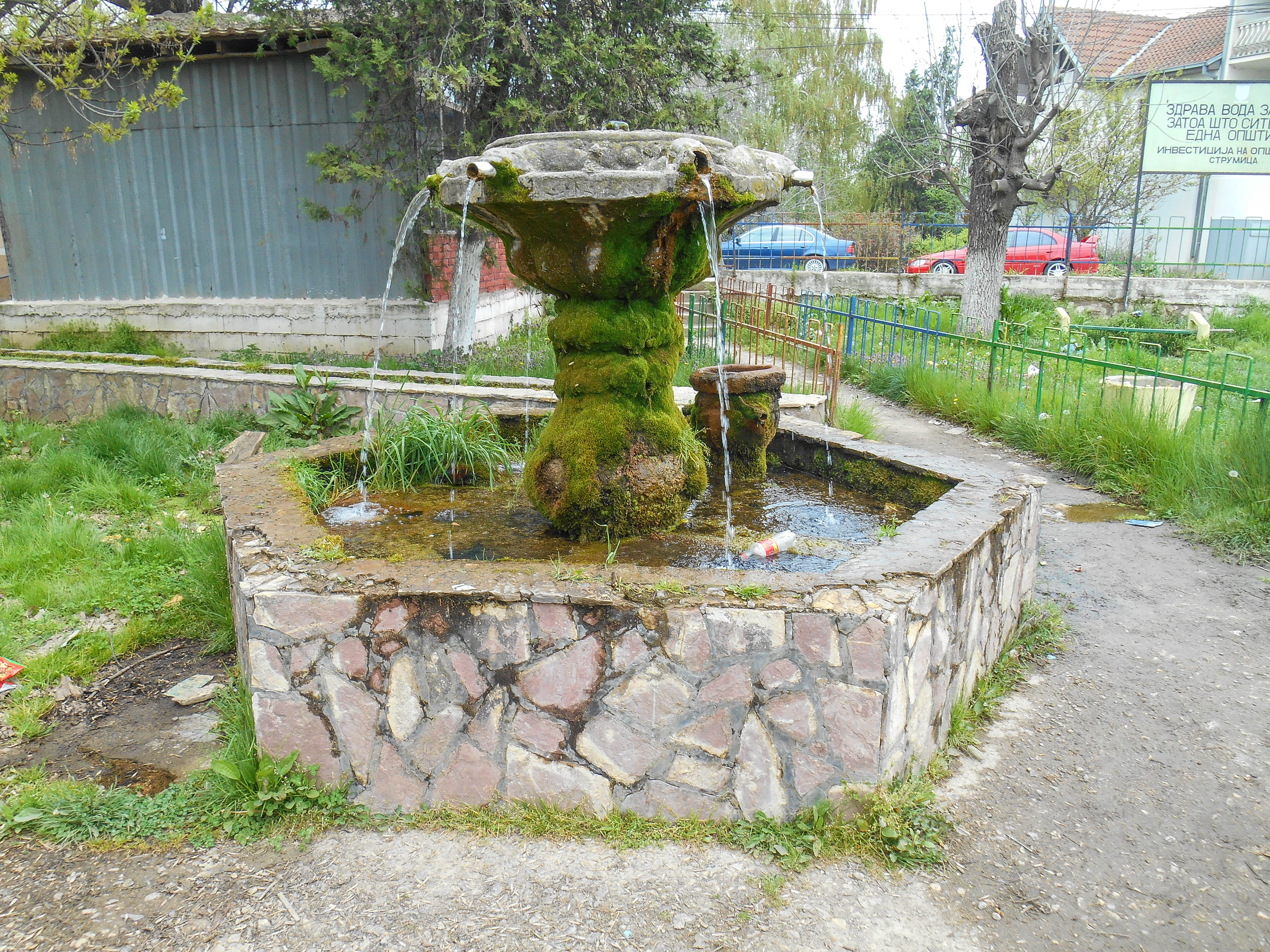 Селска чешма - Дабиље